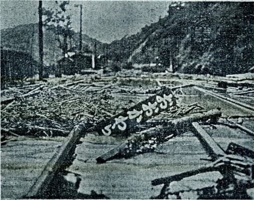 南山城水害の被害を受けた関西本線大河原駅。